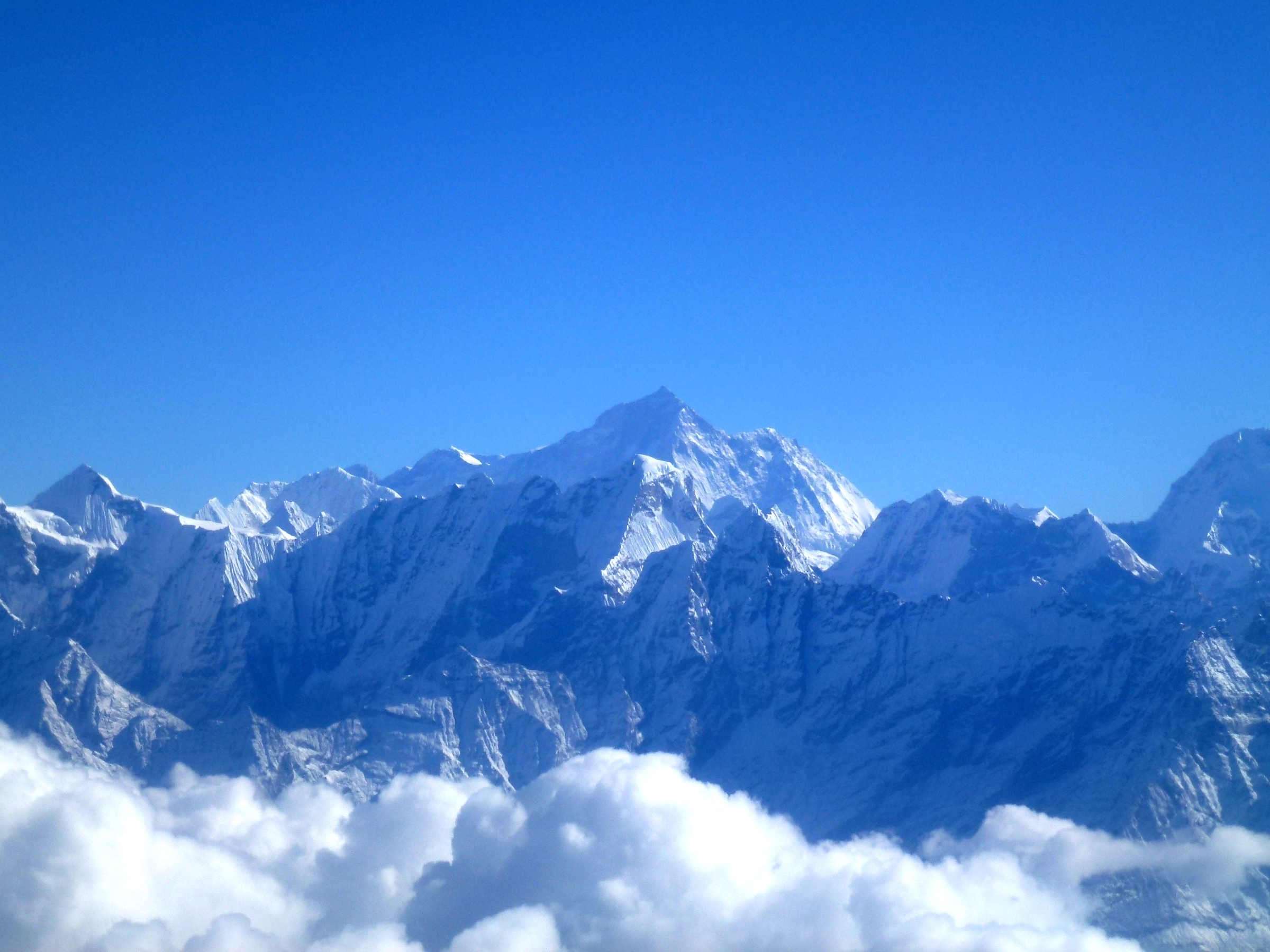 8.463m Makalu Himalaya Mountain Flights Nepal